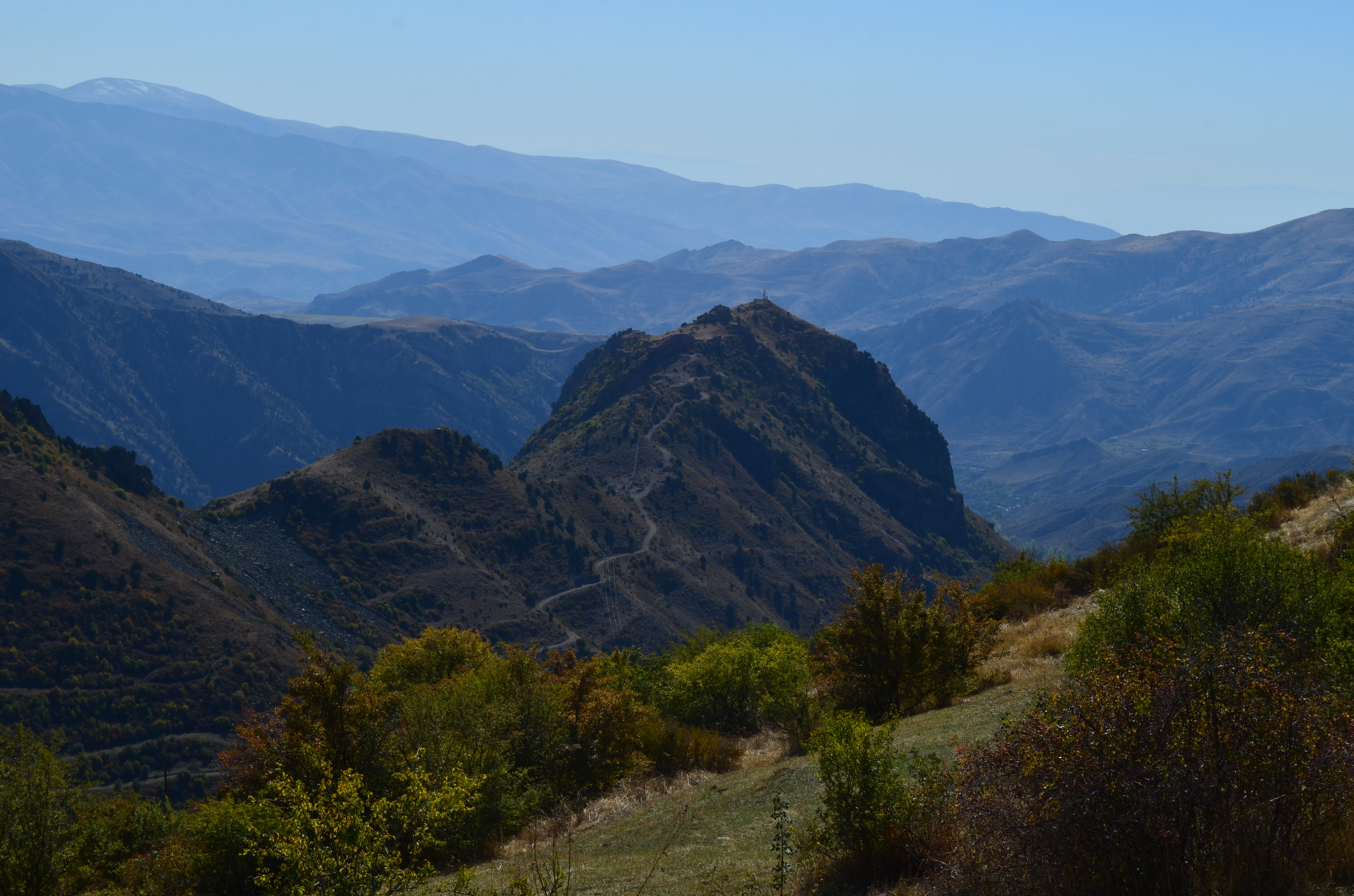 «Սմբատասար» բնապատմական համալիր